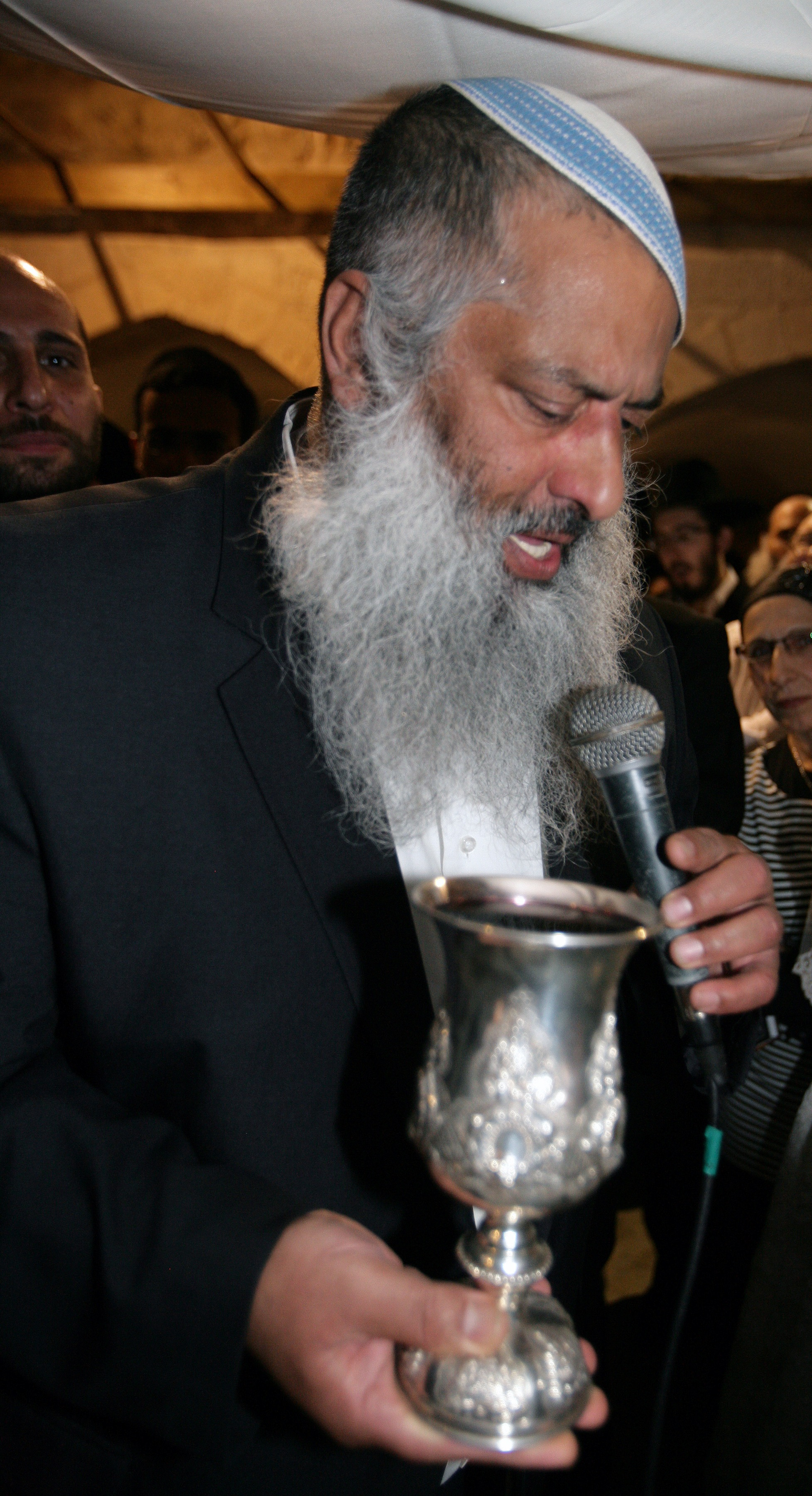 הרב ישראל אביחי ראש ישיבת בית אל